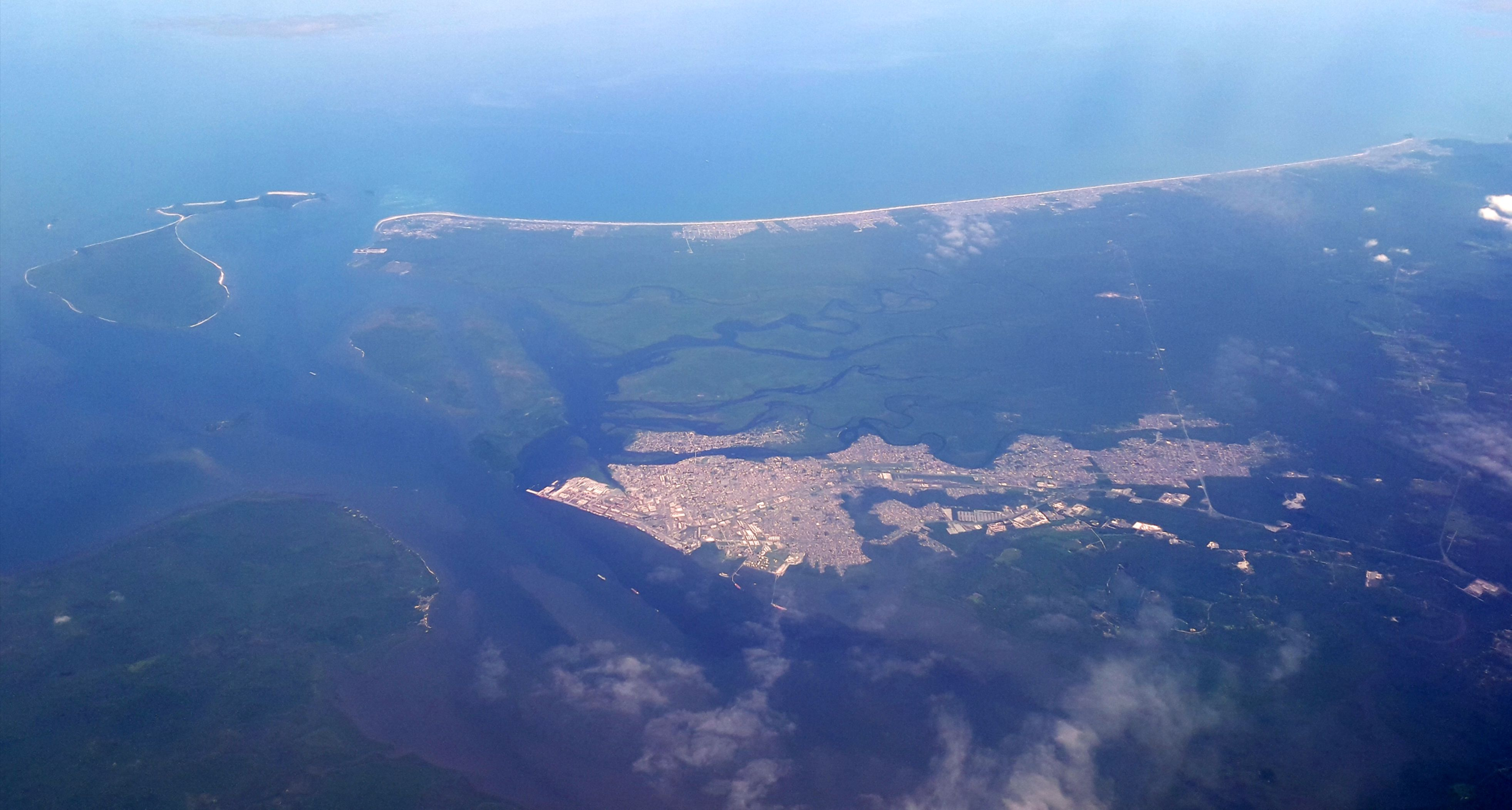 Vista aérea de la ciudad de Paranaguá, Brasil